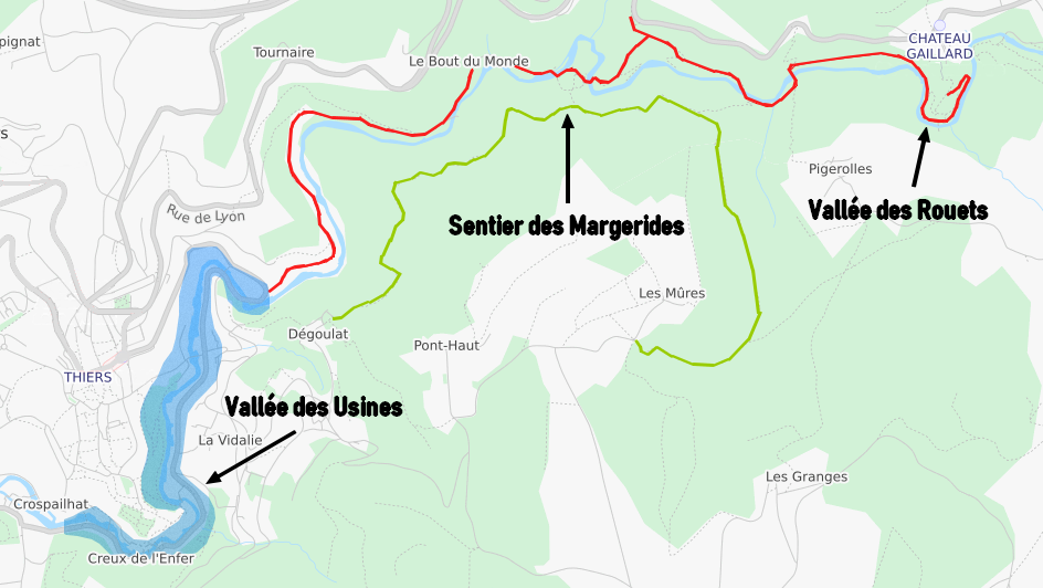 Carte des sites touristiques de la Durolle This map may be incomplete, and may contain errors. Don't rely solely on it for navigation.